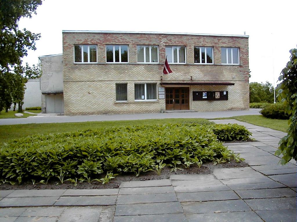 Krimuldas pagastmāja Raganā 2002-05-25